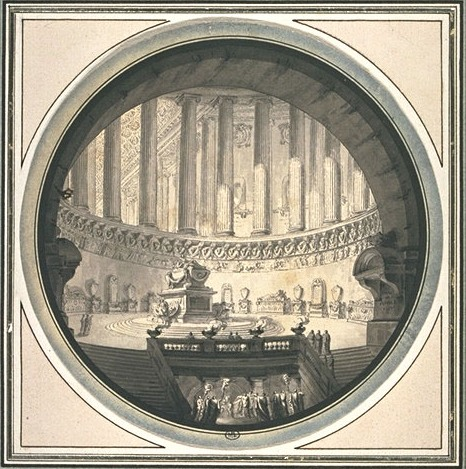 Vue d'une salle d'un temple en rotonde. 1766. Plume et encre noire, lavis gris. Forme ronde. Signé et daté, sur le pilier en bas à droite, à la plume et encre noire : 'Radel 1766'. H. 00,169 m ; L. 00,169 m Paris, musée du Louvre, inv. : RF 29499